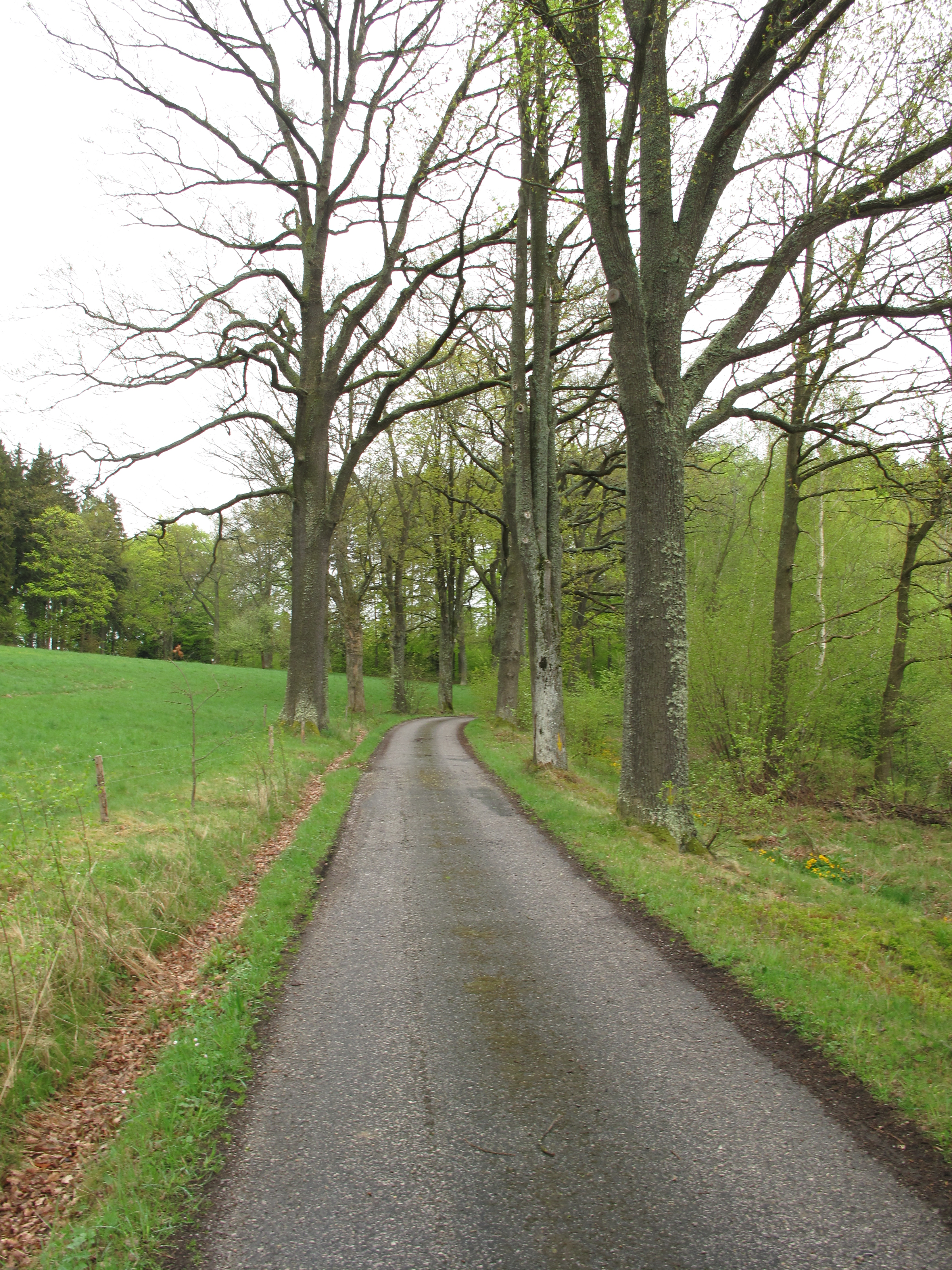 Silnice stromořadí Borové aleje. Česká republika.